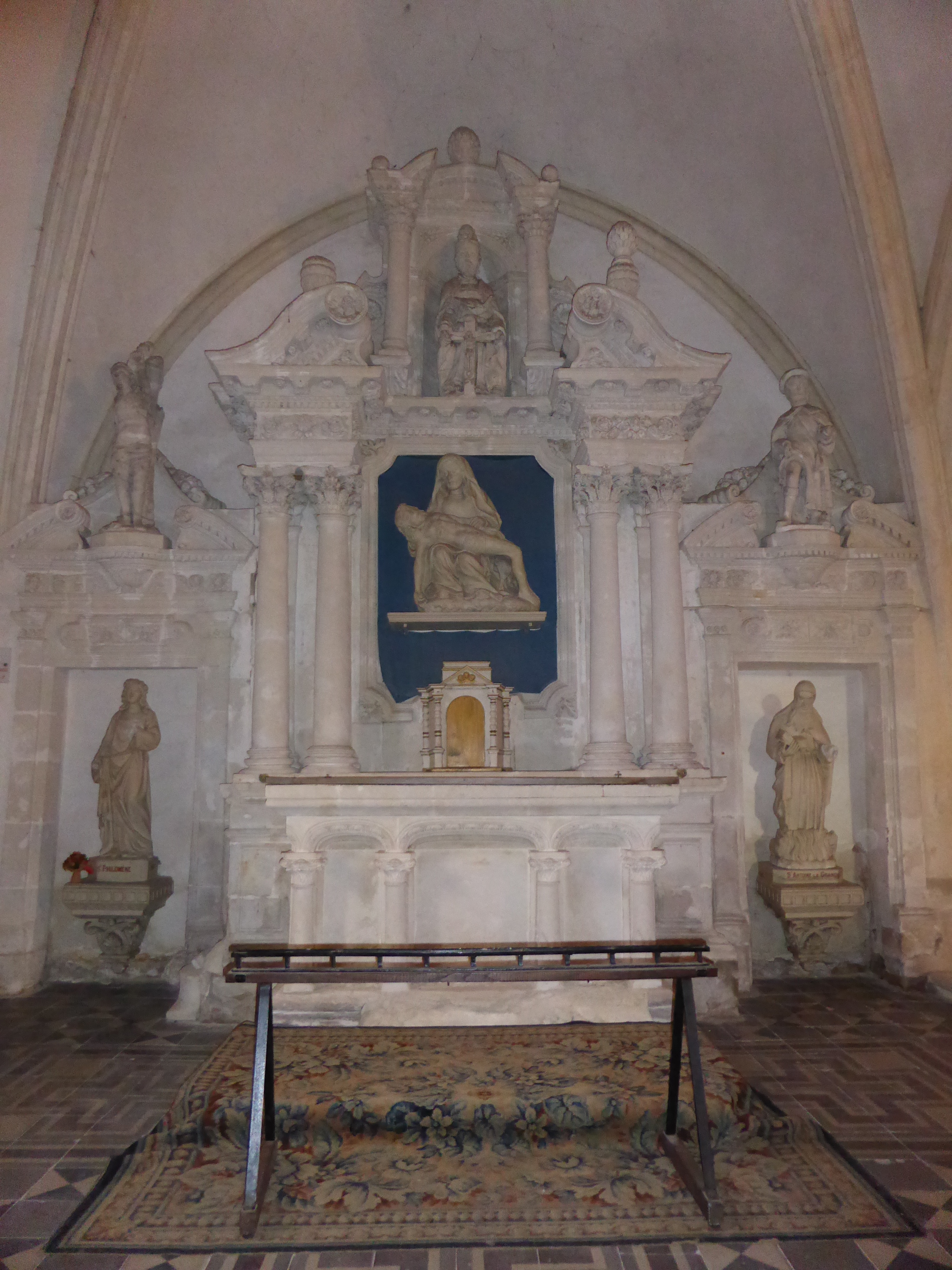 Retable en pierre, à colonne corinthienne jumelée, encadrant une Pieta, sous une représentation de la Sainte Trinité.